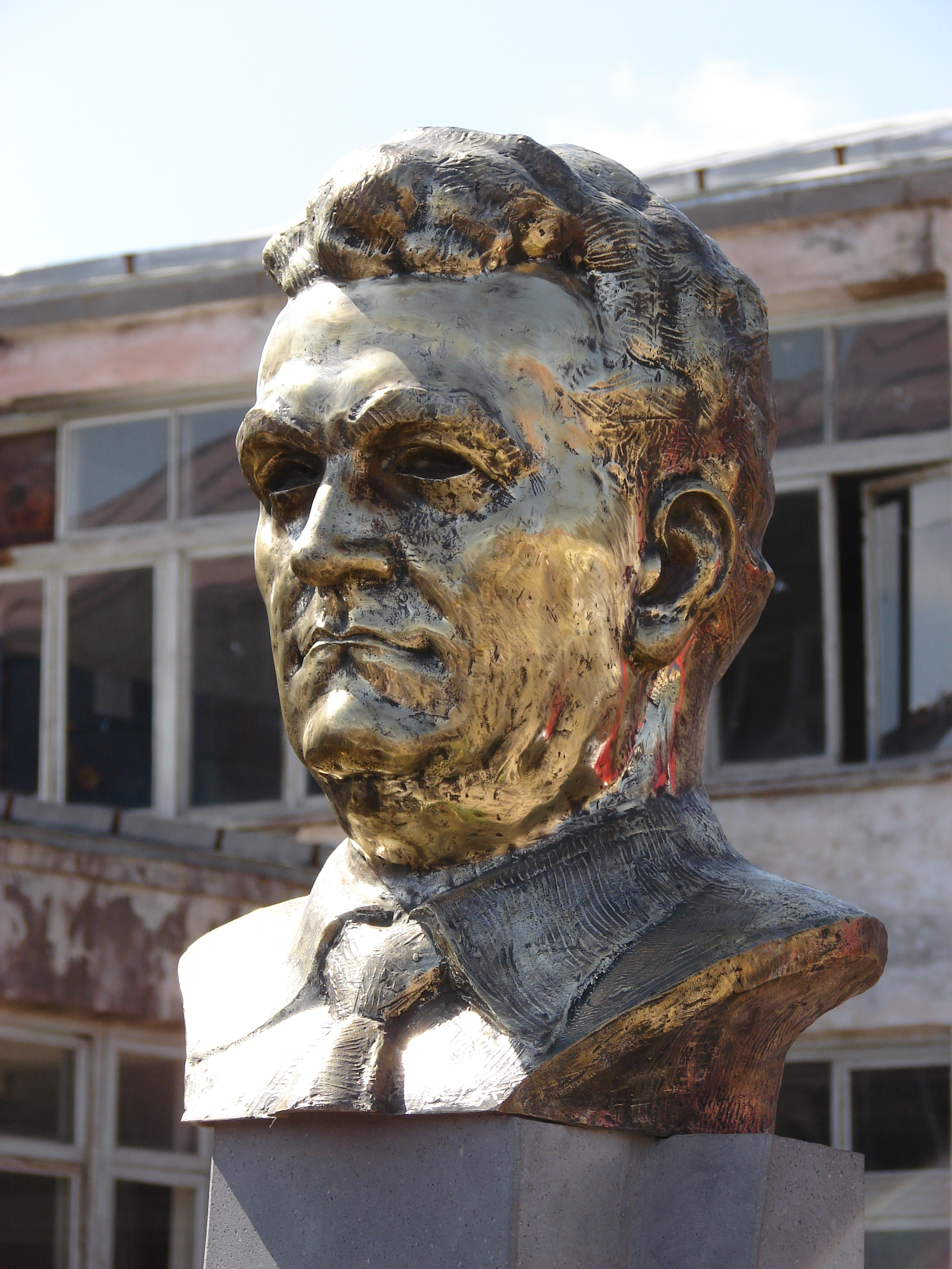 Սուրեն Թովմասյանի կիսանդրին դպրոցի բակում, բացվել է 2007 թվականին